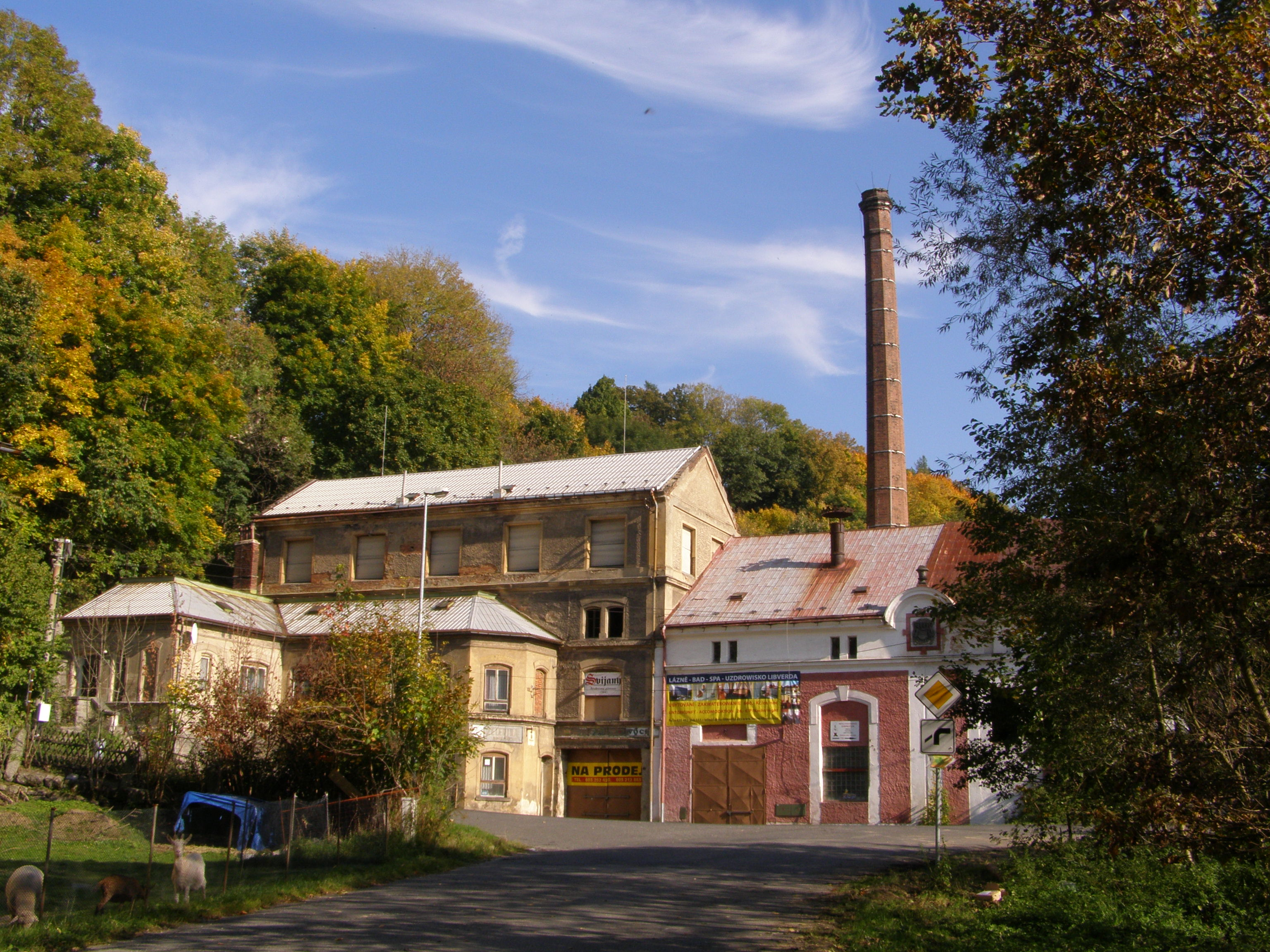 Frýdlant, pohled z ulice Hejnická na zámecký pivovar v ulici Zámecká